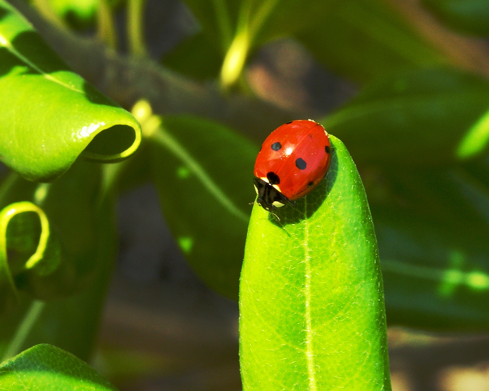 Lady bug (Coccinella septempunctata) on a leaf